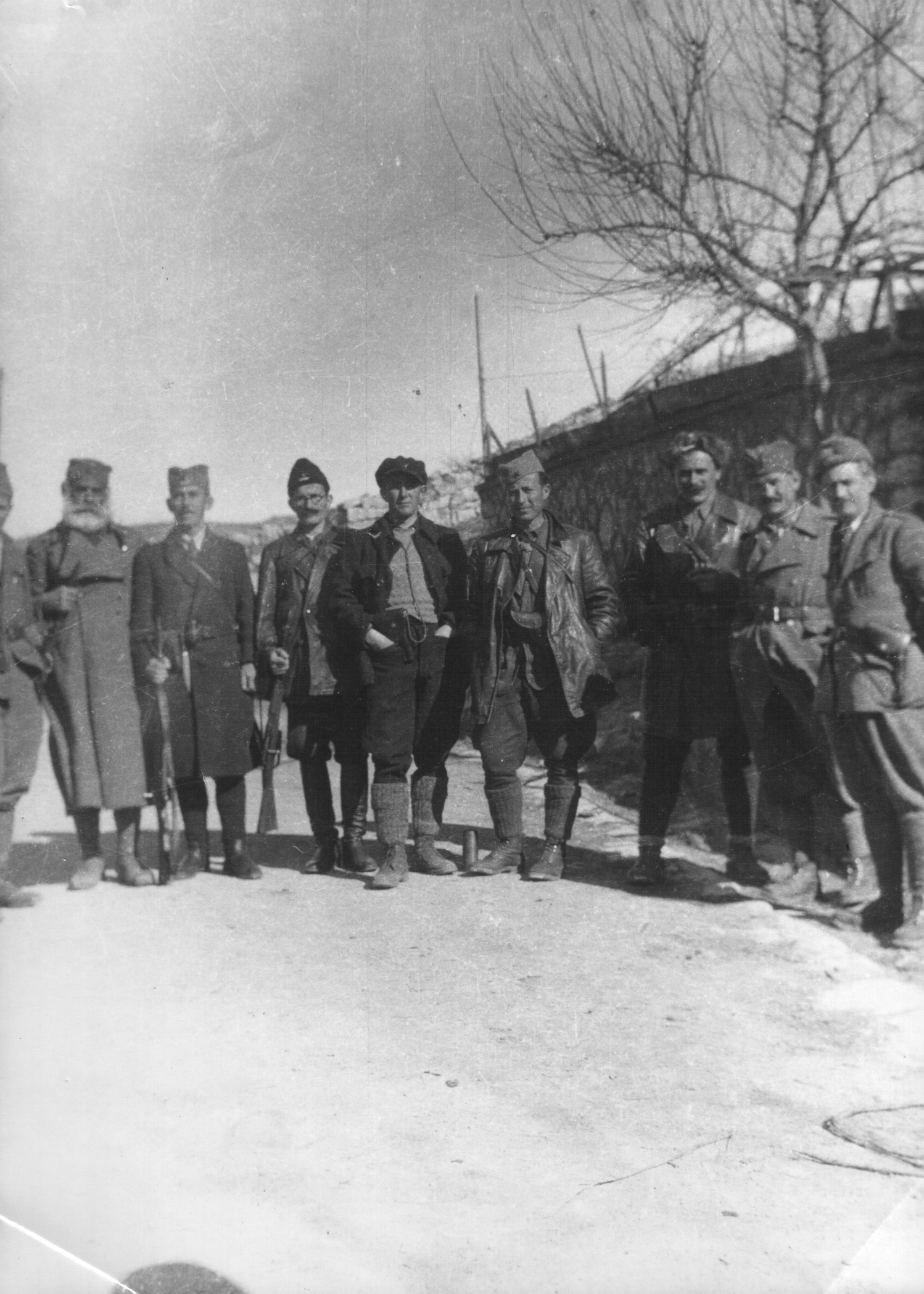 I capi partigiani in Montenegro nel 1942; da sinistra: Doko Pavicevi, Savo Orovic, Ivan Milutinovic, Milovan Gilas, Mitar Bakic, Sava Kovacevic, Radoje Dakic